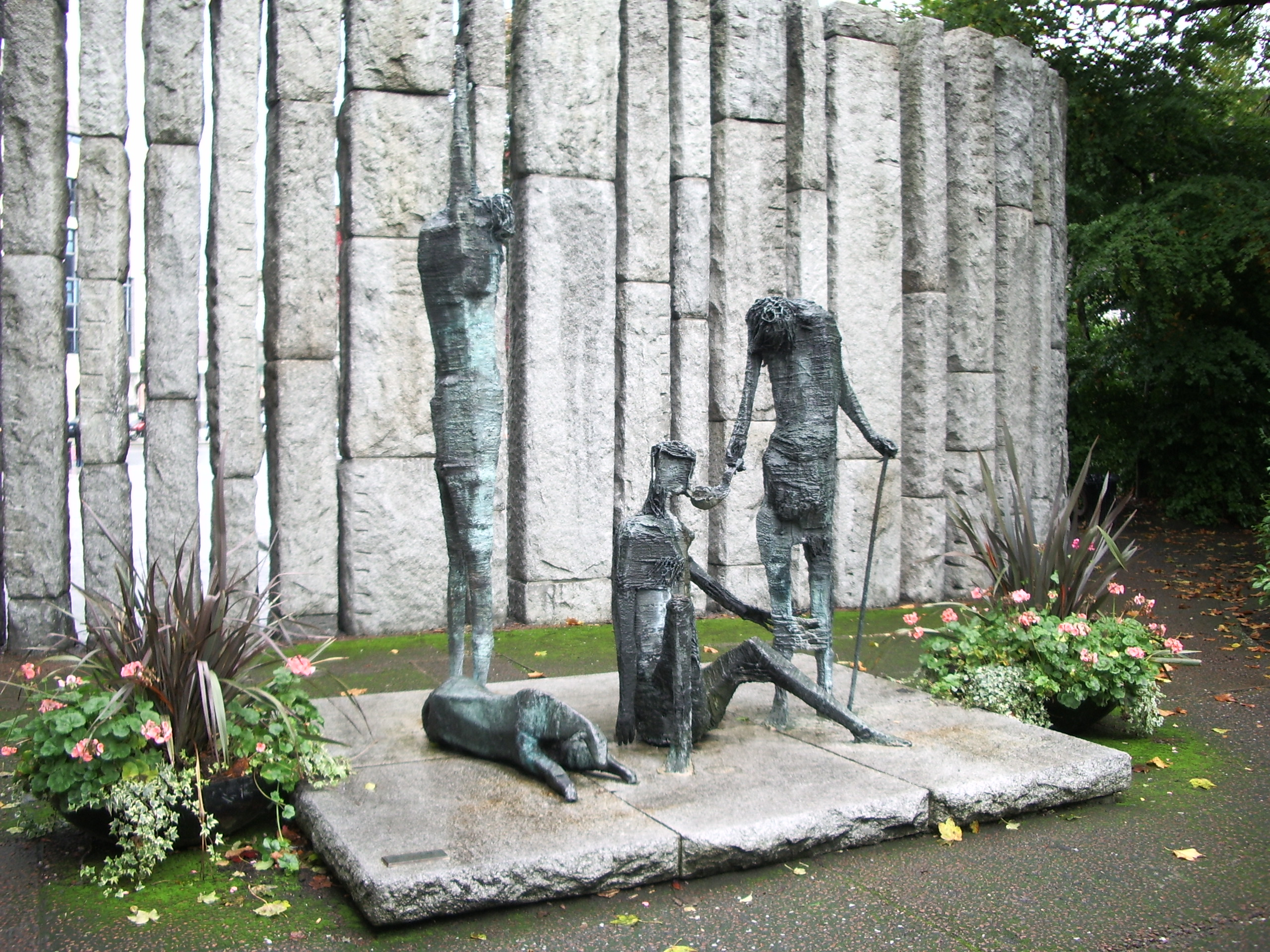 Denkmal für die Opfer der Famine von Edward Delaney R.H.A. im St. Stephen's Green in Dublin. Bild selbst erstellt im November 2005 F.Erzberger